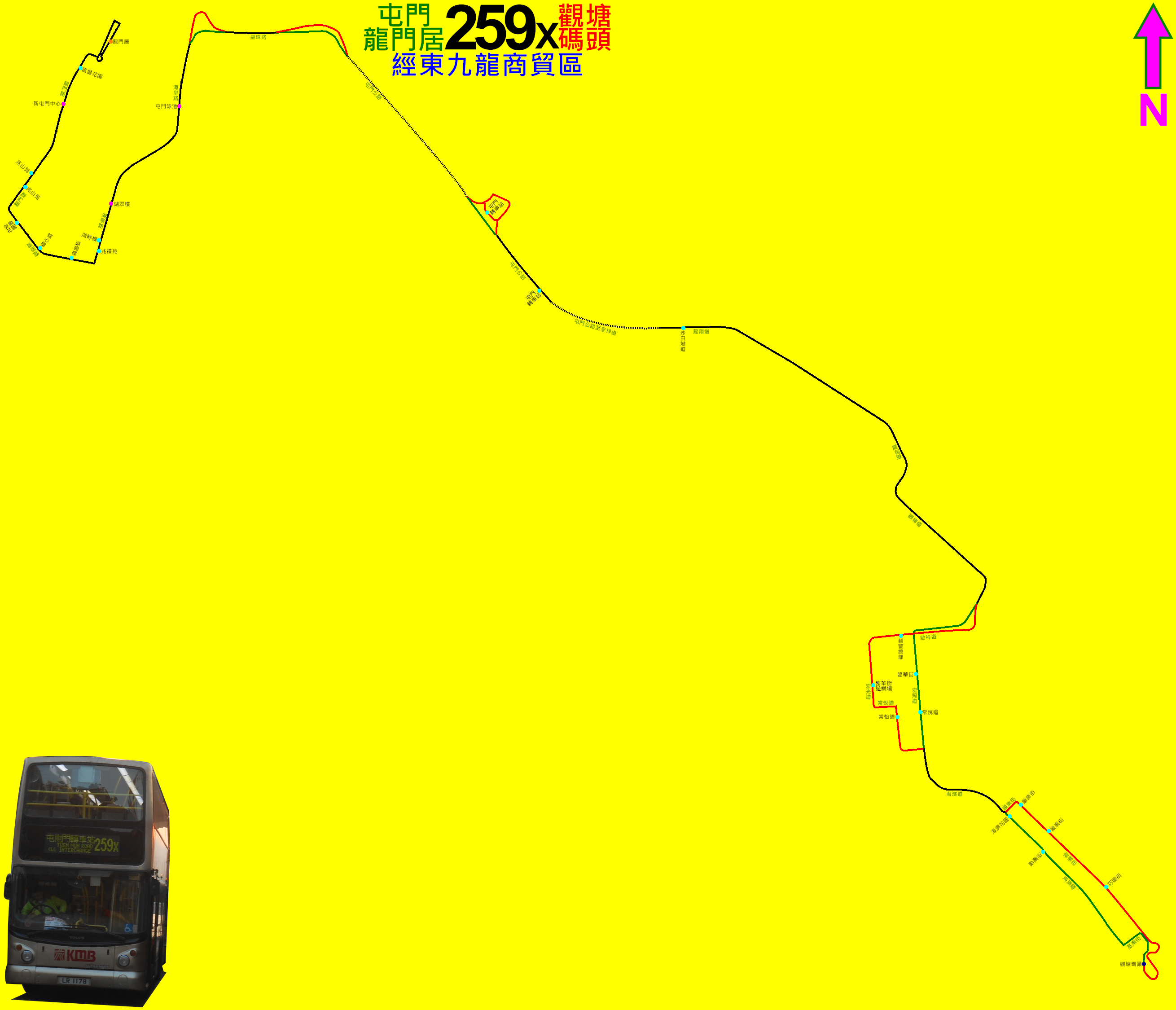 中文（香港）: 九巴259X線的走線圖